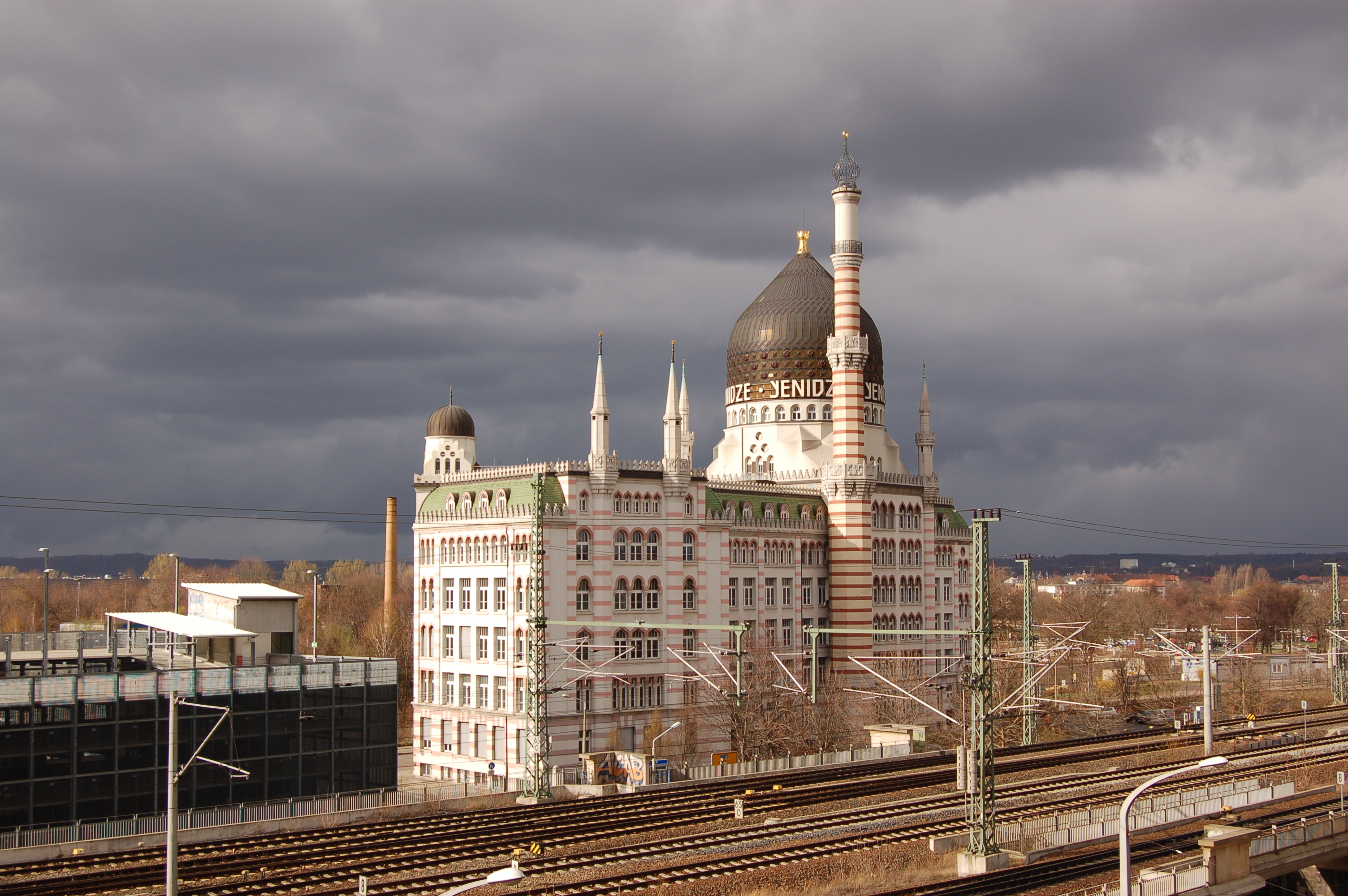 Die denkmalgeschützte Yenidze in Dresden.